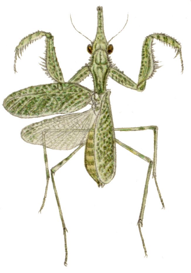 Blepharodes cornutus femelle